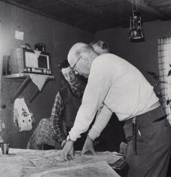 Urho Kekkonen huhtikuussa 1958 Pudasjärven Sarakylässä sijaitsevan asutustilallisen Reino Vähäkuopuksen talossa tutkimassa kartalta hiihtoreittiä.